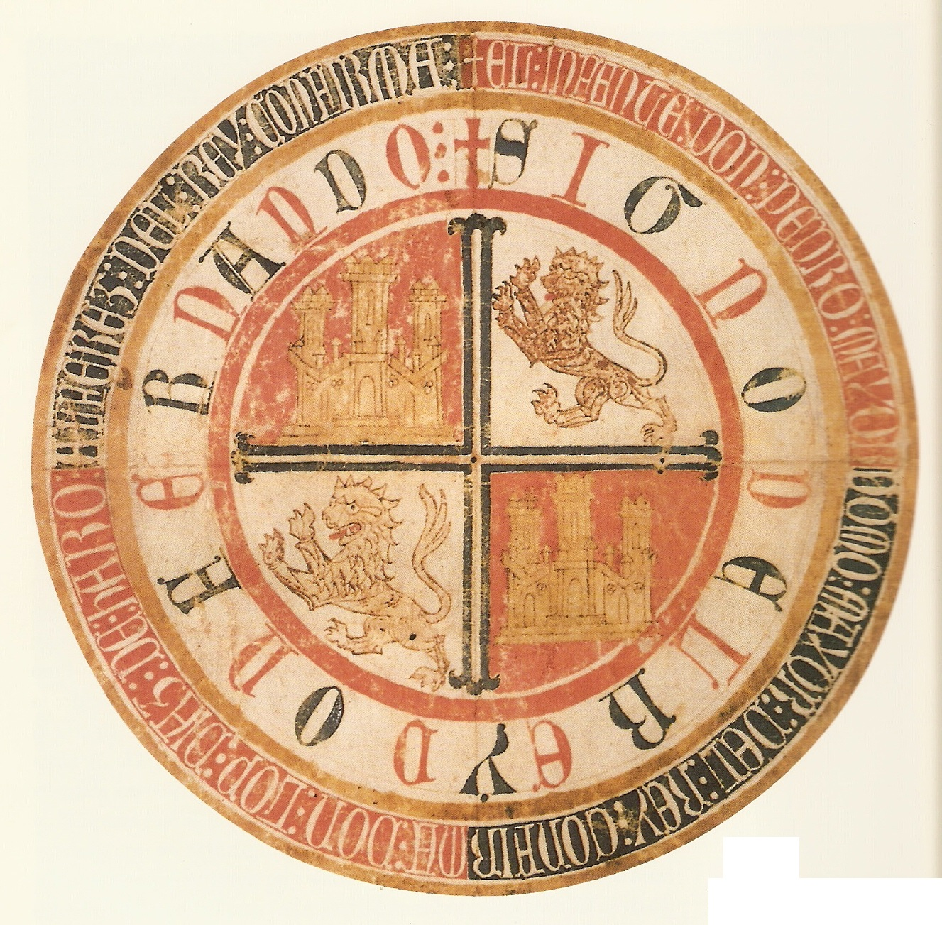 Rueda de un privilegio rodado del rey Fernando IV de Castilla (1285-1312). El documento se custodia en el monasterio de San Clemente de Sevilla, provincia de Sevilla (España).